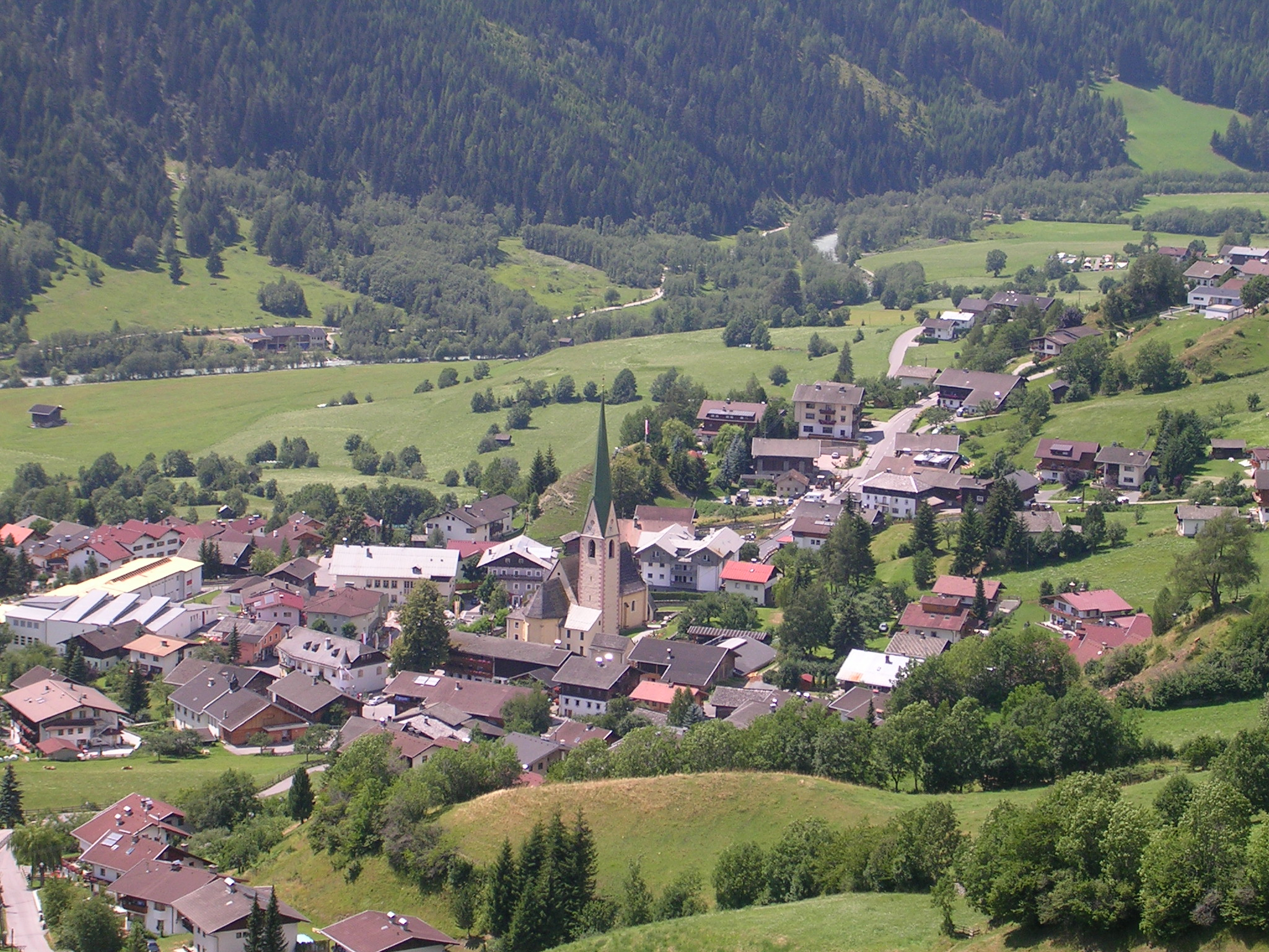 Gemeinde Virgen, Blick auf die Fraktion Virgen-Dorf von der Burgruine Rabenstein